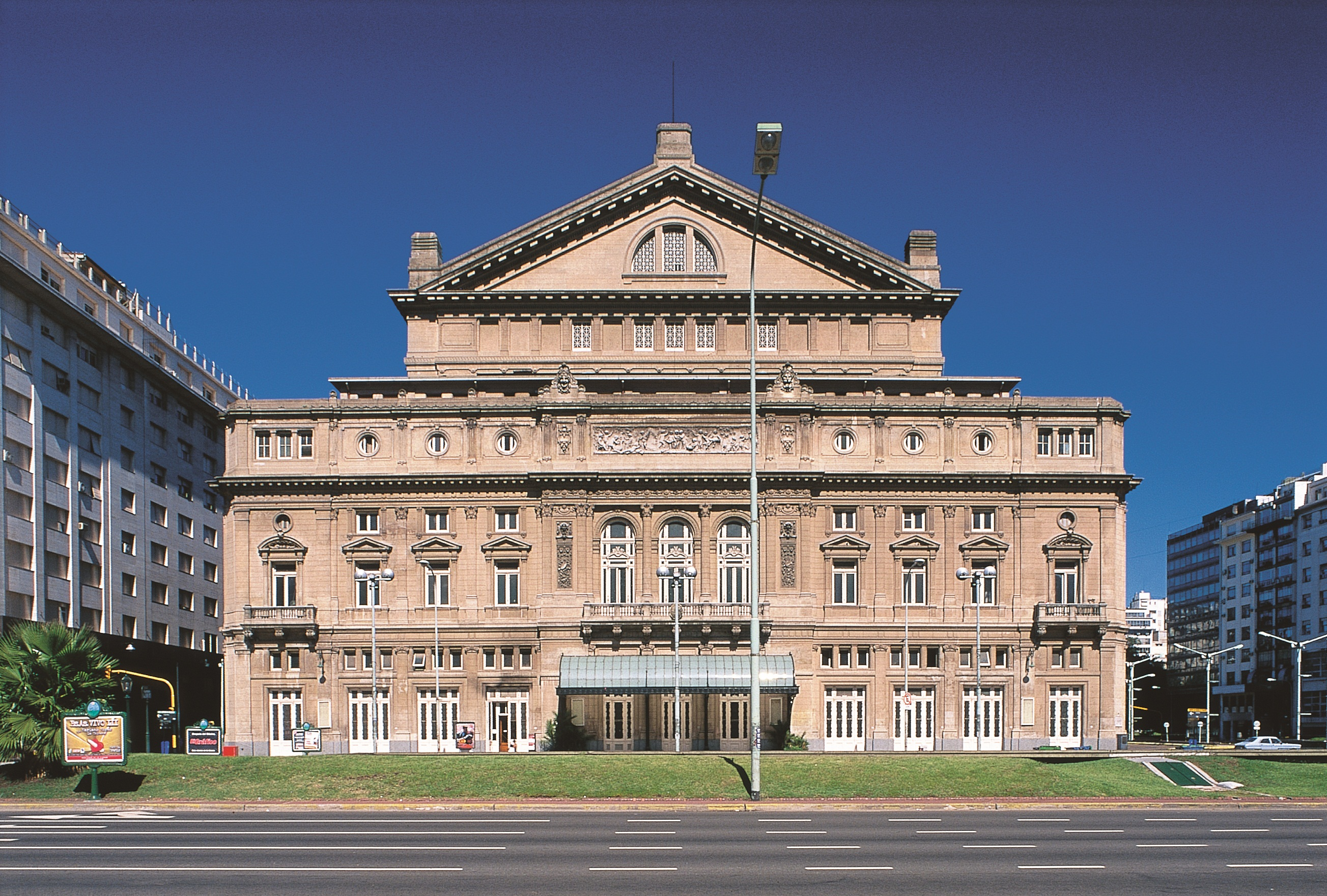 Teatro Colón, San Nicolás, Ciudad Autónoma de Buenos Aires.